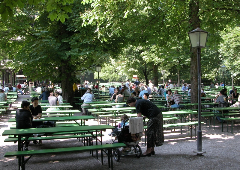 Englischer Garten, München (Munich), Deutschland (Germany)